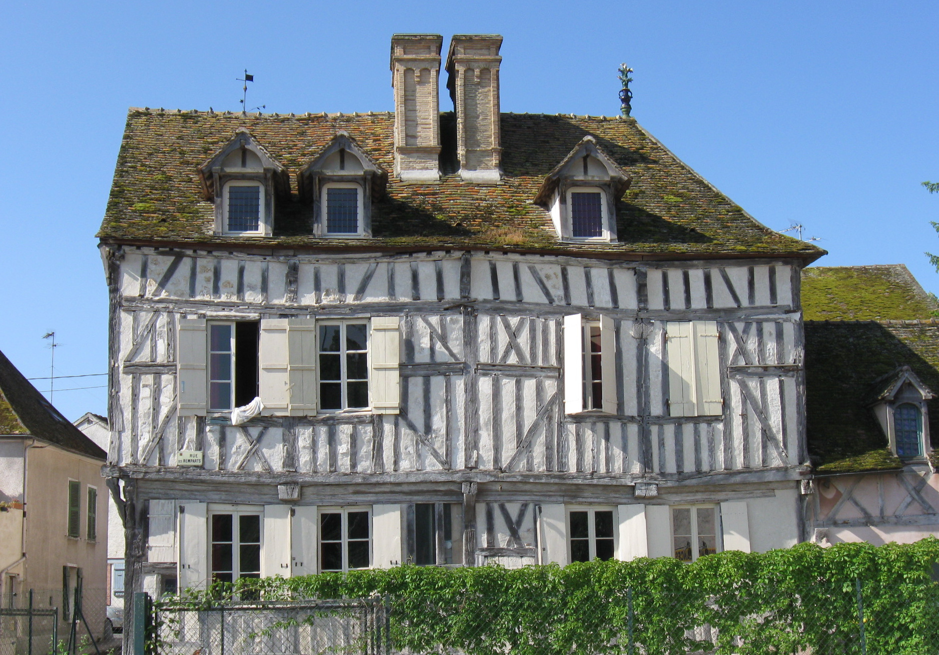 Hostel du Minage. (10 rue des Remparts, Bray-sur-Seine, département de la Seine-et-Marne, région Île-de-France).